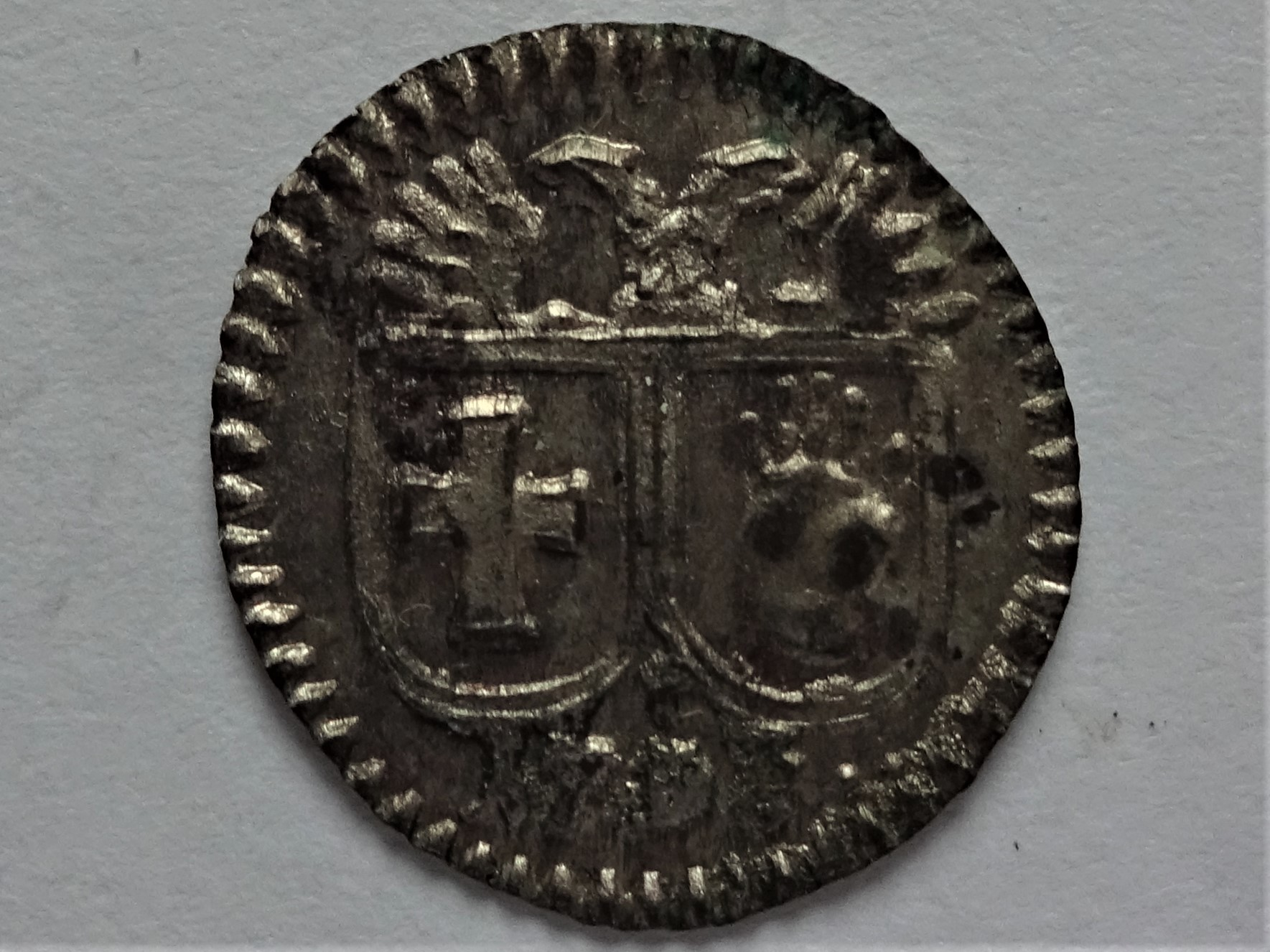 Schwäbisch Hall, der letzte Silberpfennig der Stadt, einseitig geprägt, Jahr 1798, Gerhard Schön, Deutscher Münzkatalog Nr. 3